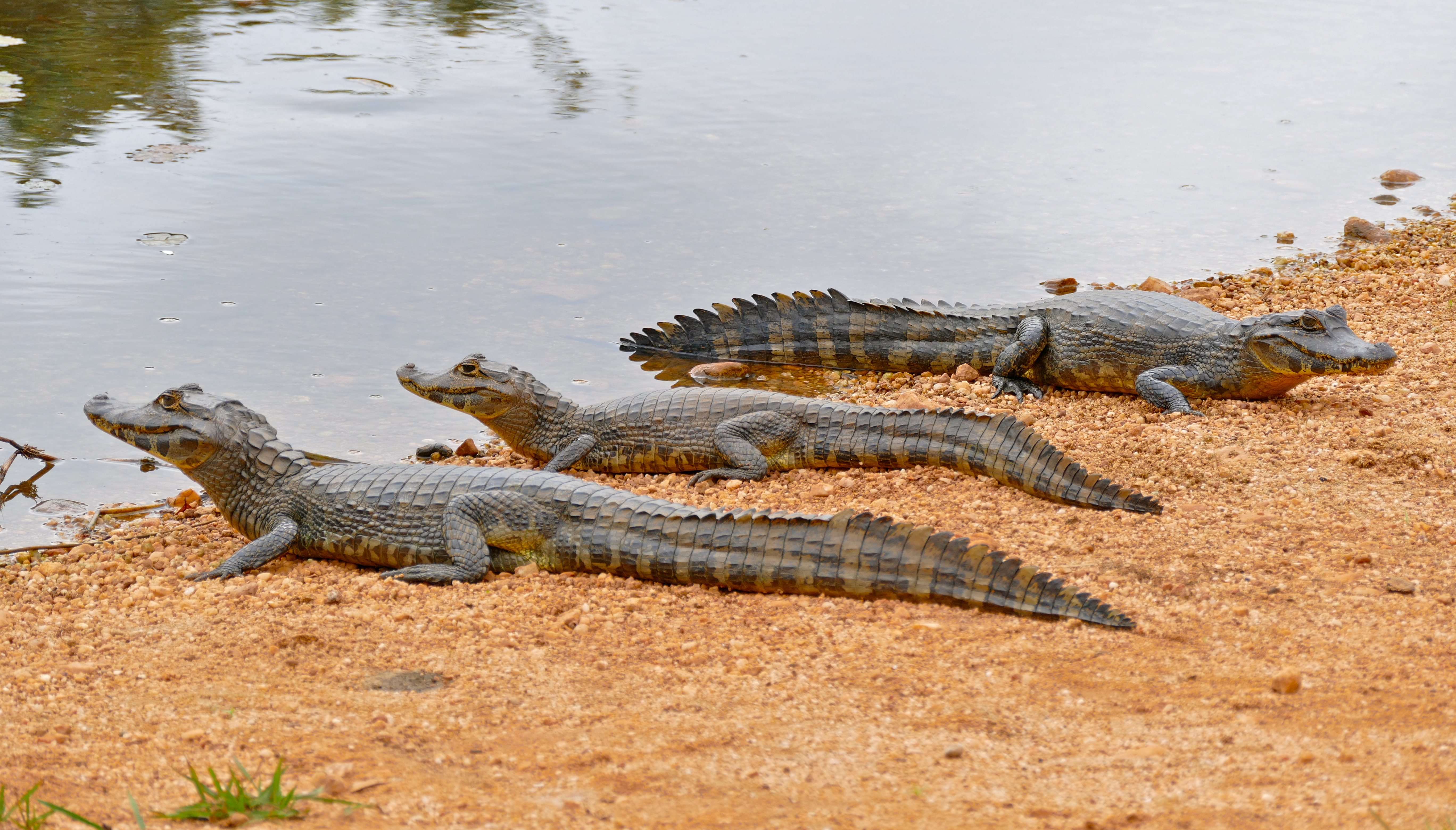 Transpantaneira, Poconé, Mato Grosso, BRAZIL